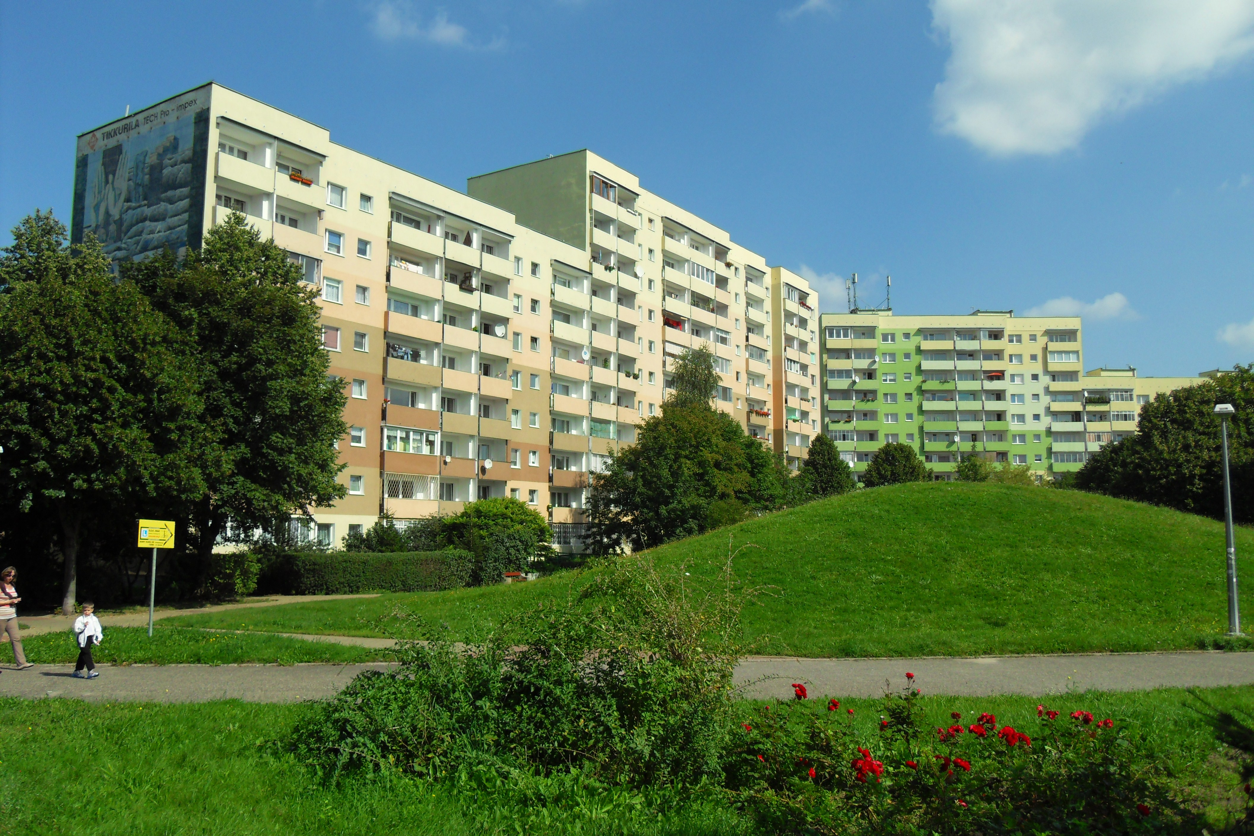 Gdańsk Zaspa Młyniec, ul. Startowa 7 (po lewej) i 5 (po prawej).